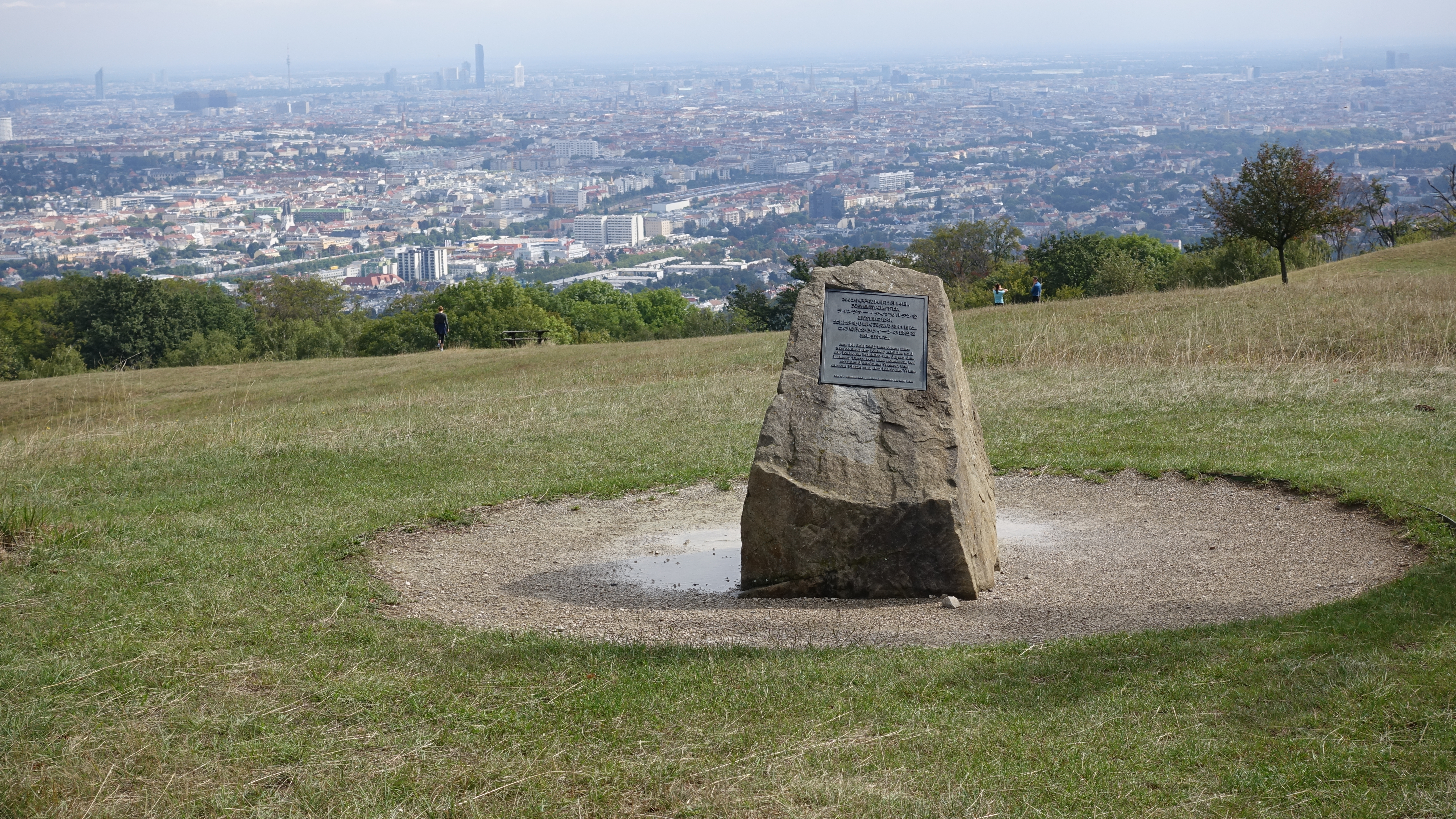 Gedenkstein im Lainzer Tiergarten